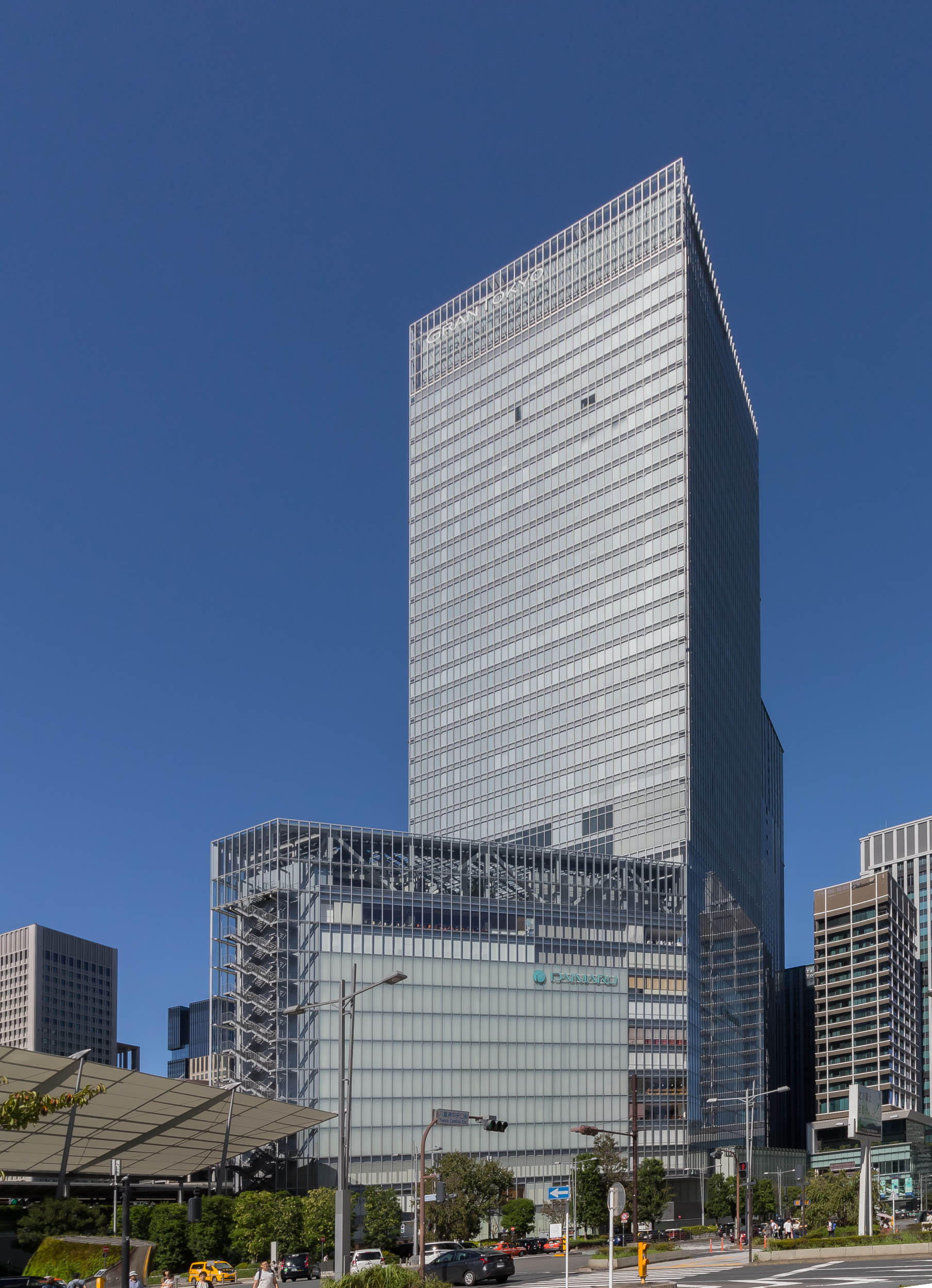 グラントーキョーノースタワー。大丸東京店。大和証券グループ本社